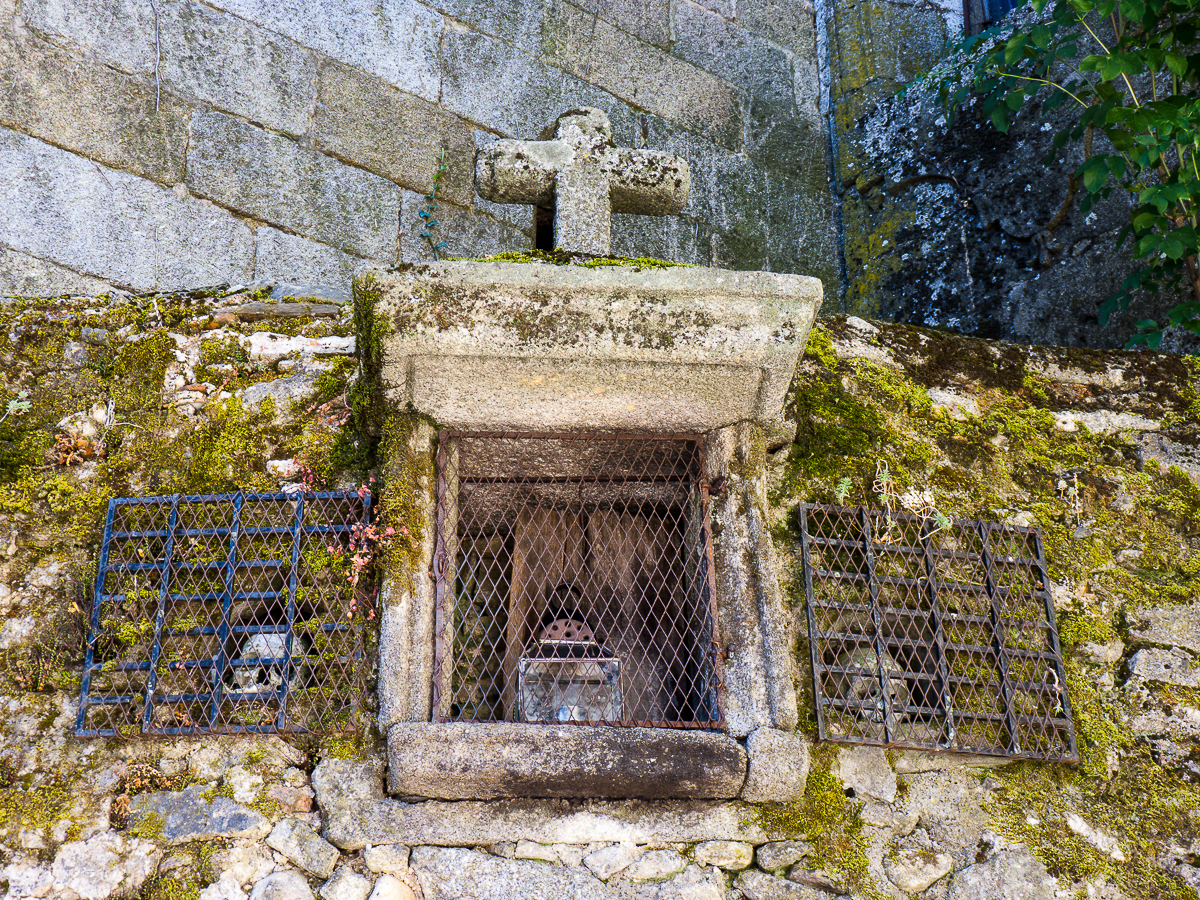 03082013 110738 ALBERCA 0044